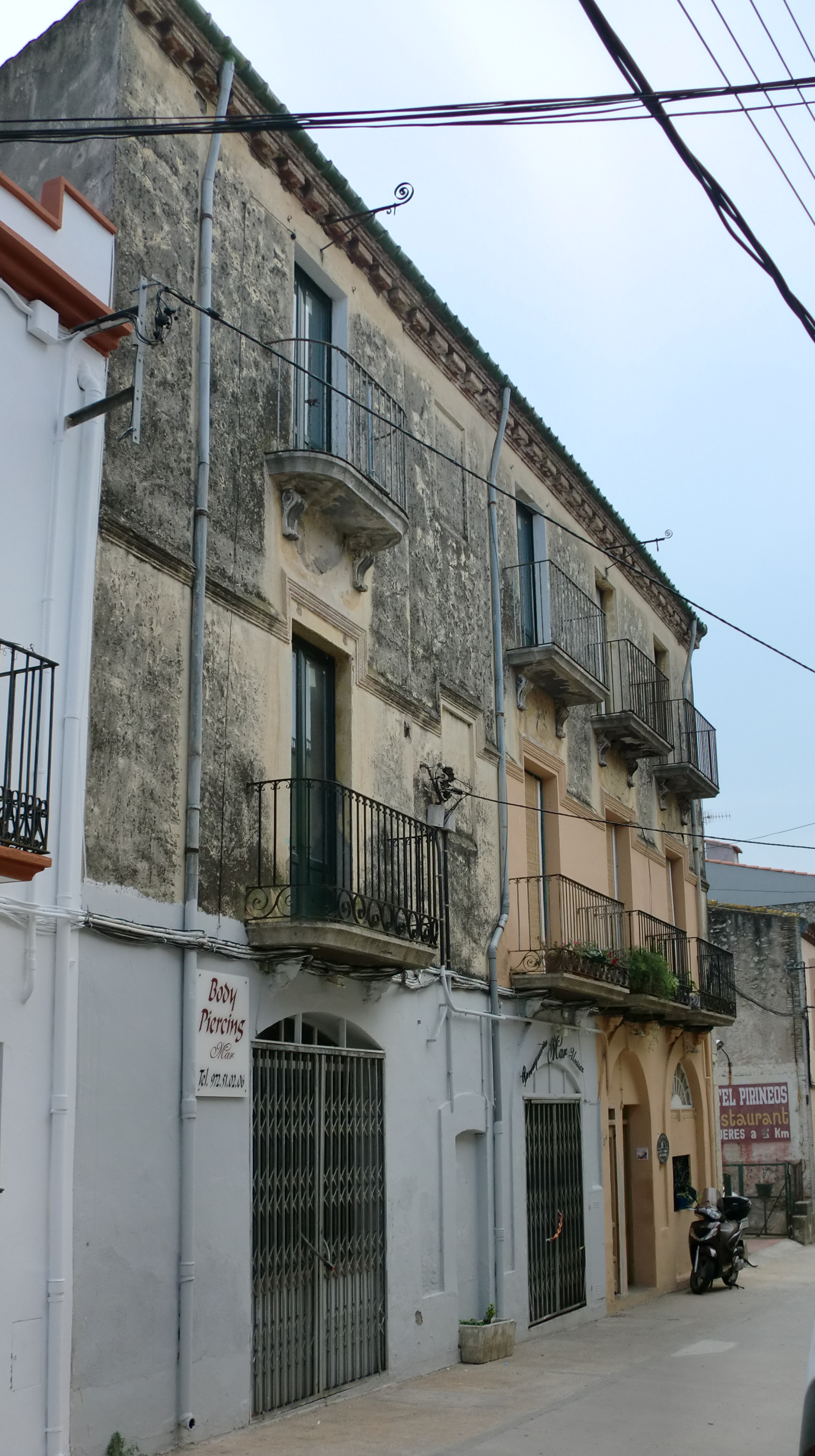 Casa al carrer del Pont, 20 (Pont de Molins)